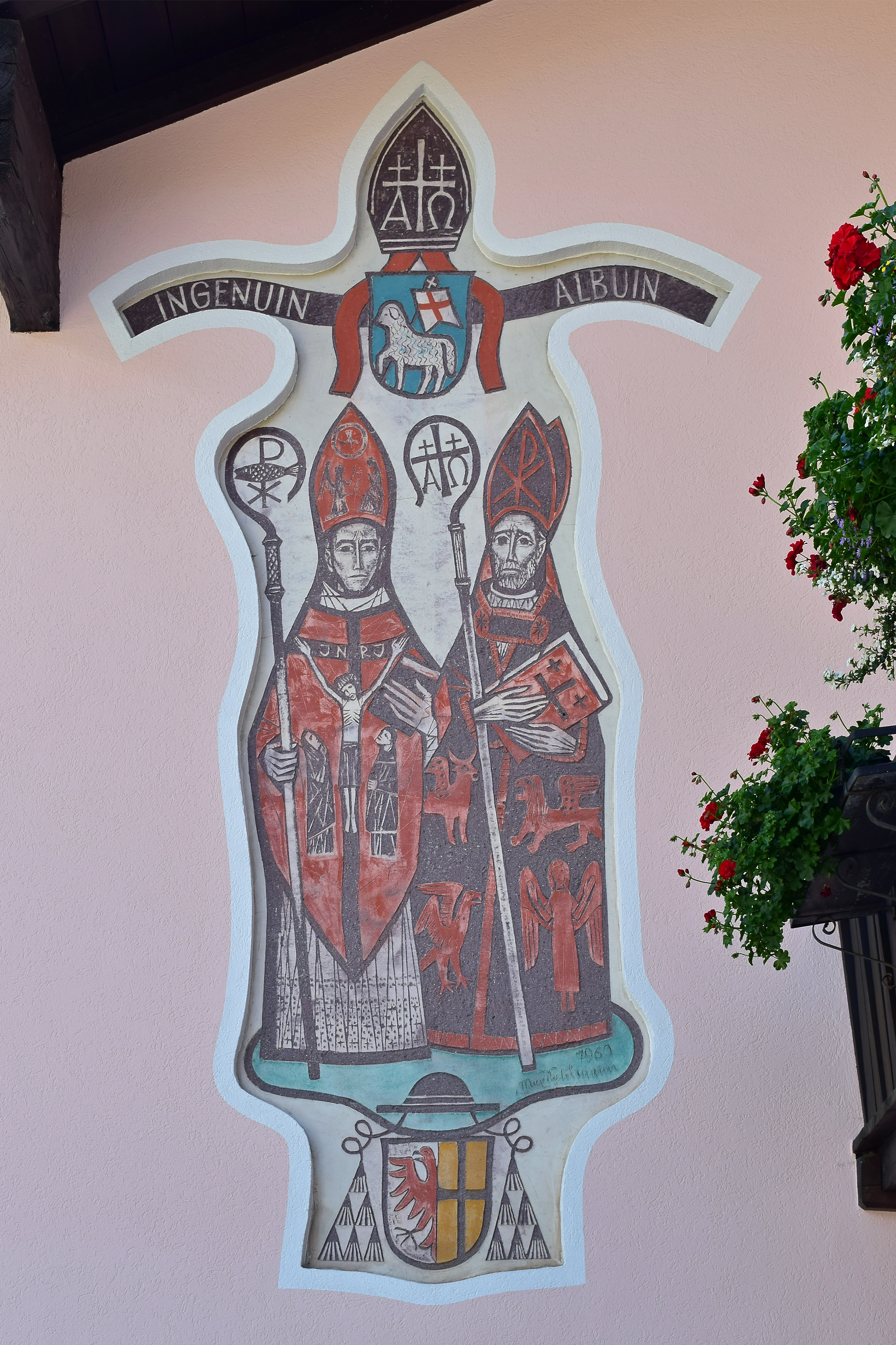 Widum der Pfarre Hippach in Schwendau, Darstellung der Brixner Diözesanpatrone Ingenuin und Albuin, Diözesanwappen von Brixen und Innsbruck, vom Max Spielmann, 1960